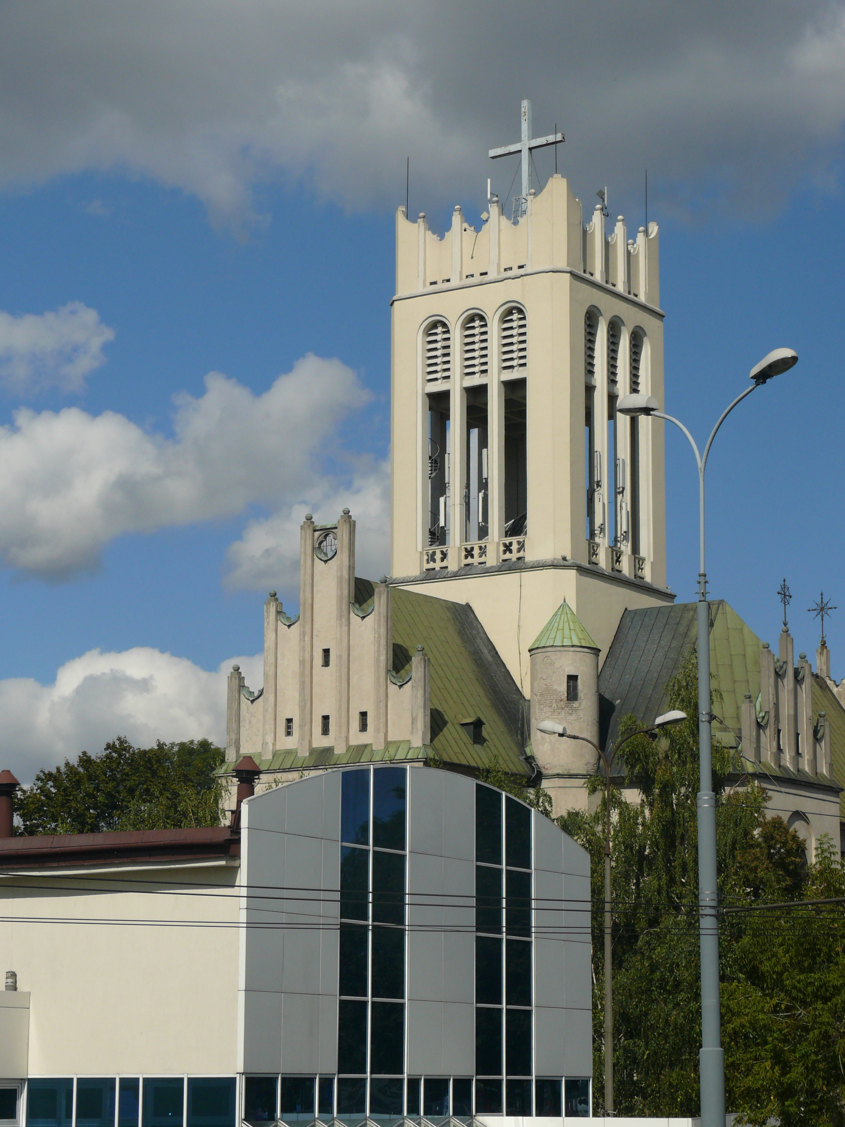 kościół parafialny pod wezwaniem Św. Michała Archanioła przy ulicy Fabrycznej w Lublinie